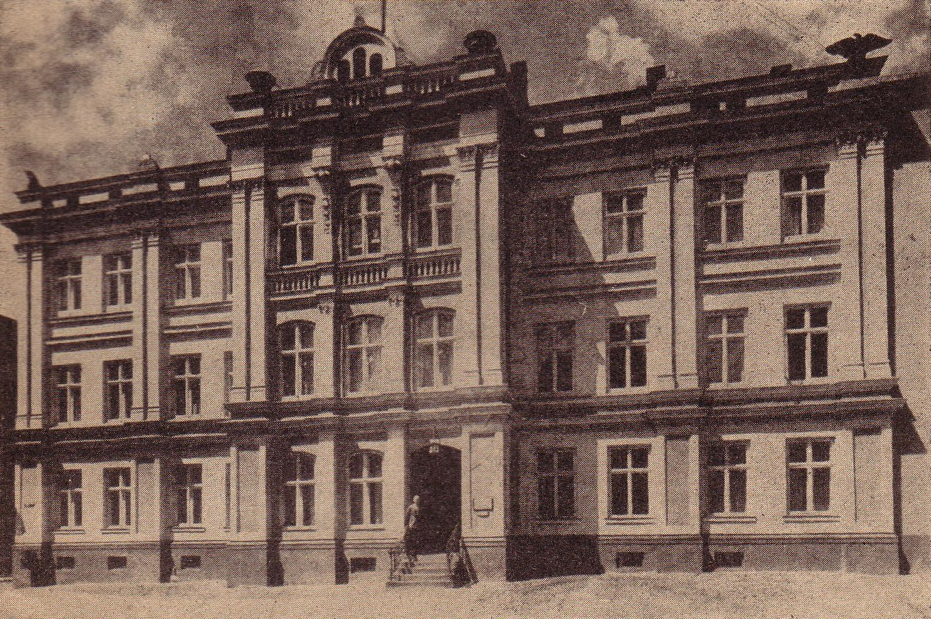 Fotografie des Hauses Lange Reihe 4 (früher 7) in Königsberg. Als Oberpräsidialrat schrieb Joseph von Eichendorff hier Aus dem Leben eines Taugenichts und Ezzelin von Romano. Deshalb war auf Veranlassung von Eduard Anderson am Eingang eine Marmortafel angebracht; das Relief von Eichendorff war von Walter Rosenberg. Ab 1879 beherbergte das Haus das Ostpreußische Provinzialmuseum der Physikalisch-ökonomischen Gesellschaft. Von 1906 bis 1945 waren die weltberühmte Bernsteinsammlung der Albertus-Universität und das Geologisch-Paläontologische Institut und Museum untergebracht.